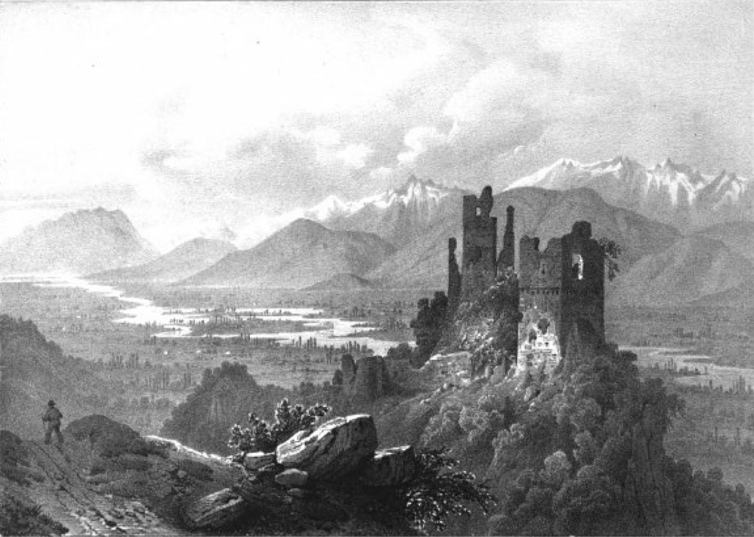 Album du Dauphiné - tome IV, litographie de ruines du chateau de Beaumont, Touvet (Isère), dependances du Baron des Adrets